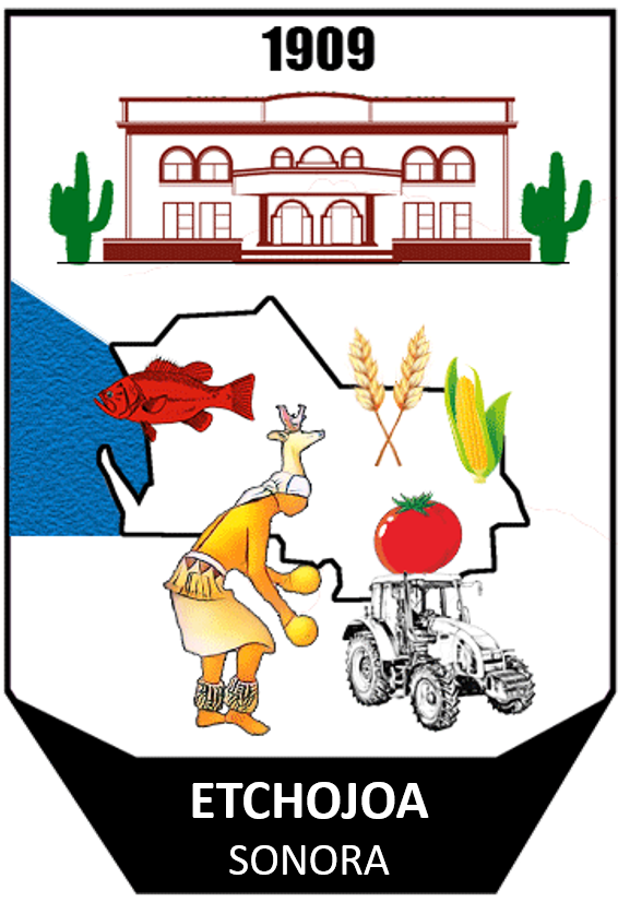 Escudo de Etchojoa, Sonora, México.